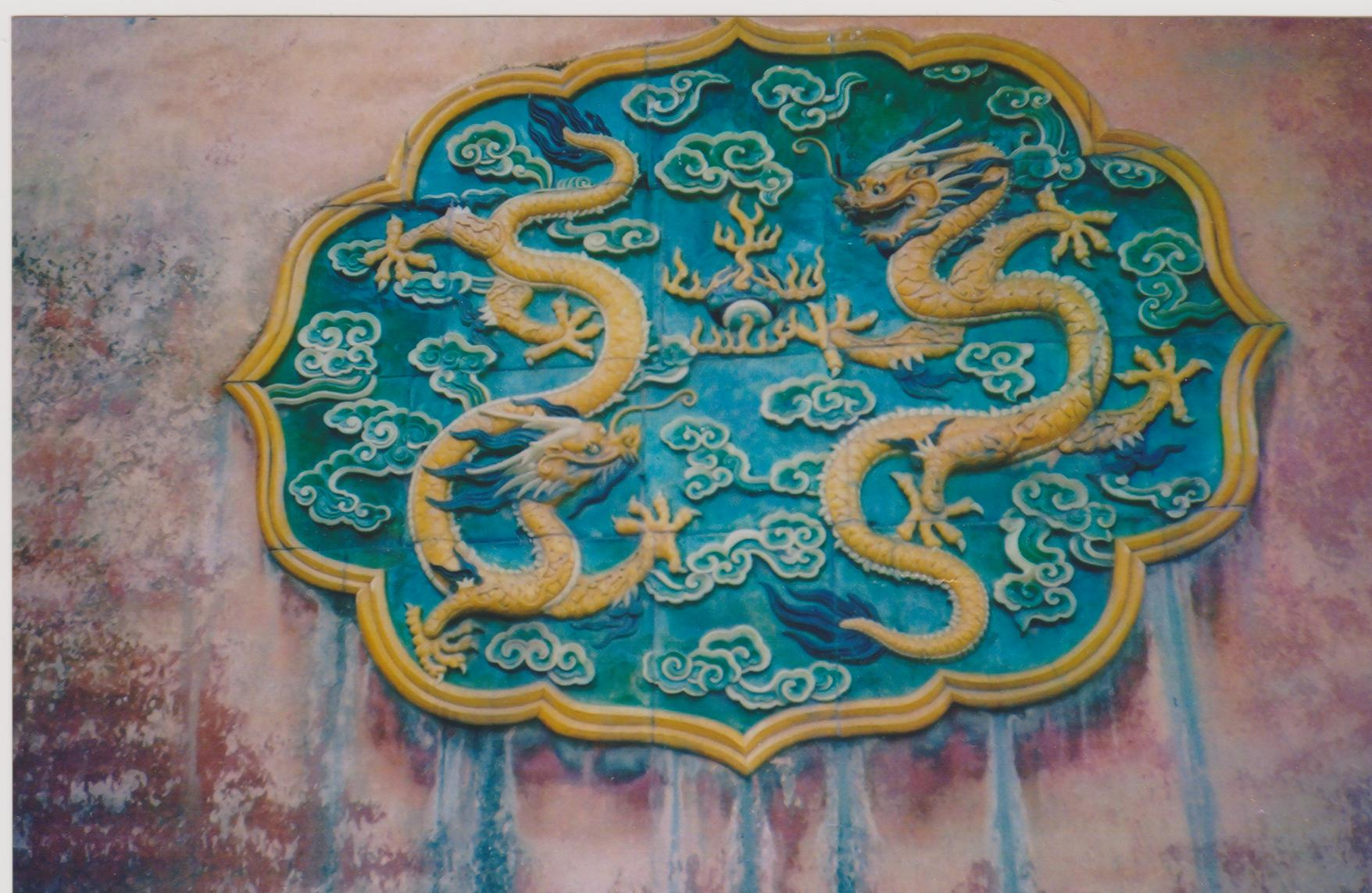 Αυτοκρατορική Πόλη, Πεκίνο. Εφυαλωμένη διακόσμηση κτιρίου. 太极殿院中的影壁